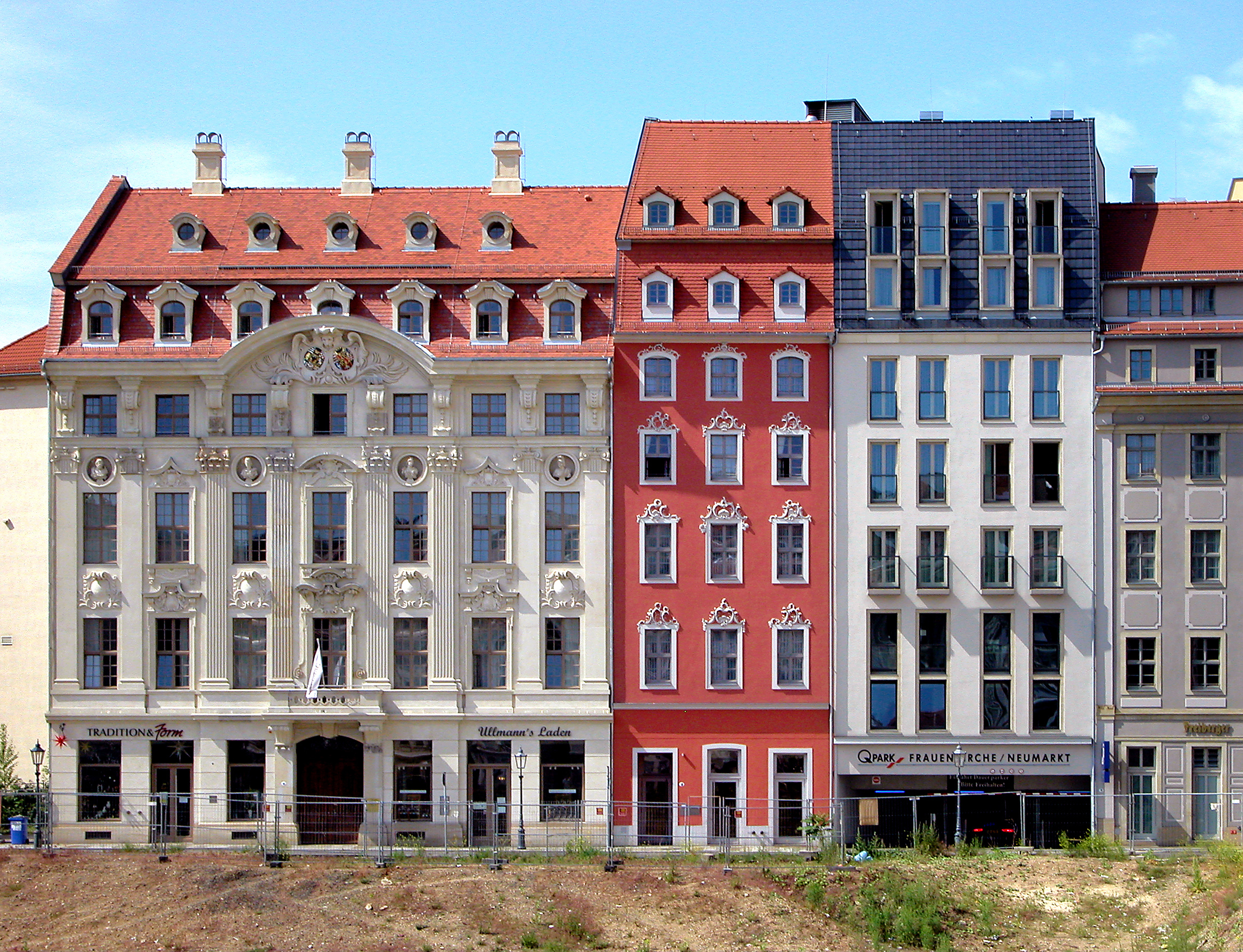 02.06.2011 01067 Dresden-Altstadt, Neumarktareal: Landhausstraße v.i.n.r. 6, 4, 2. Die Landhausstraße 6 ist das historische Palais Beichlingen (erbaut 1712-1715), ab 1855 "British Hotel". 2008-2010 wieder aufgebaut. [DSCNn2553.TID]20110602010DR.JPG(c)Blobelt